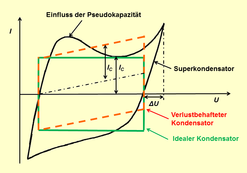 zyklisches Voltagramm, Stromverlauf statische Kondensatoren im Vergleich zum Stromverlauf bei Superkondensatoren mit großem Anteil an Pseudokapazität bei zyklischer Änderung der anliegenden Spannung